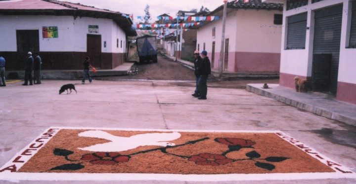 luya